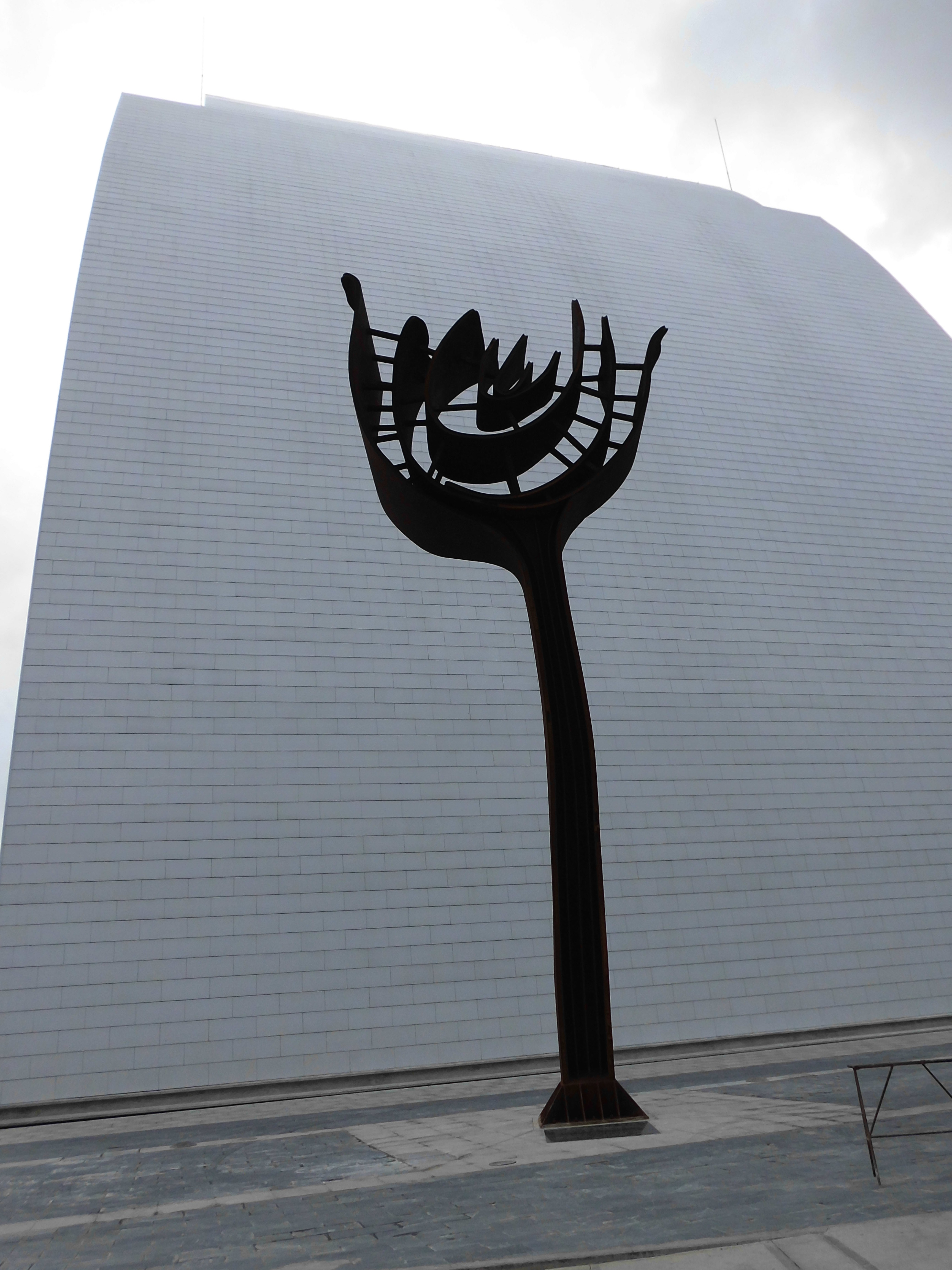 Escultura detras del Mausoleo del Libertador de América ROSA ROJA DEL PAITA REALIZADA POR DOMÉNICO SILVESTRO